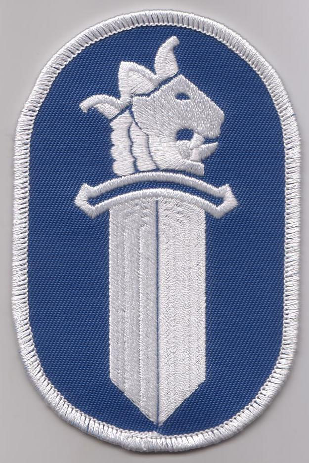 police patch Finland 2